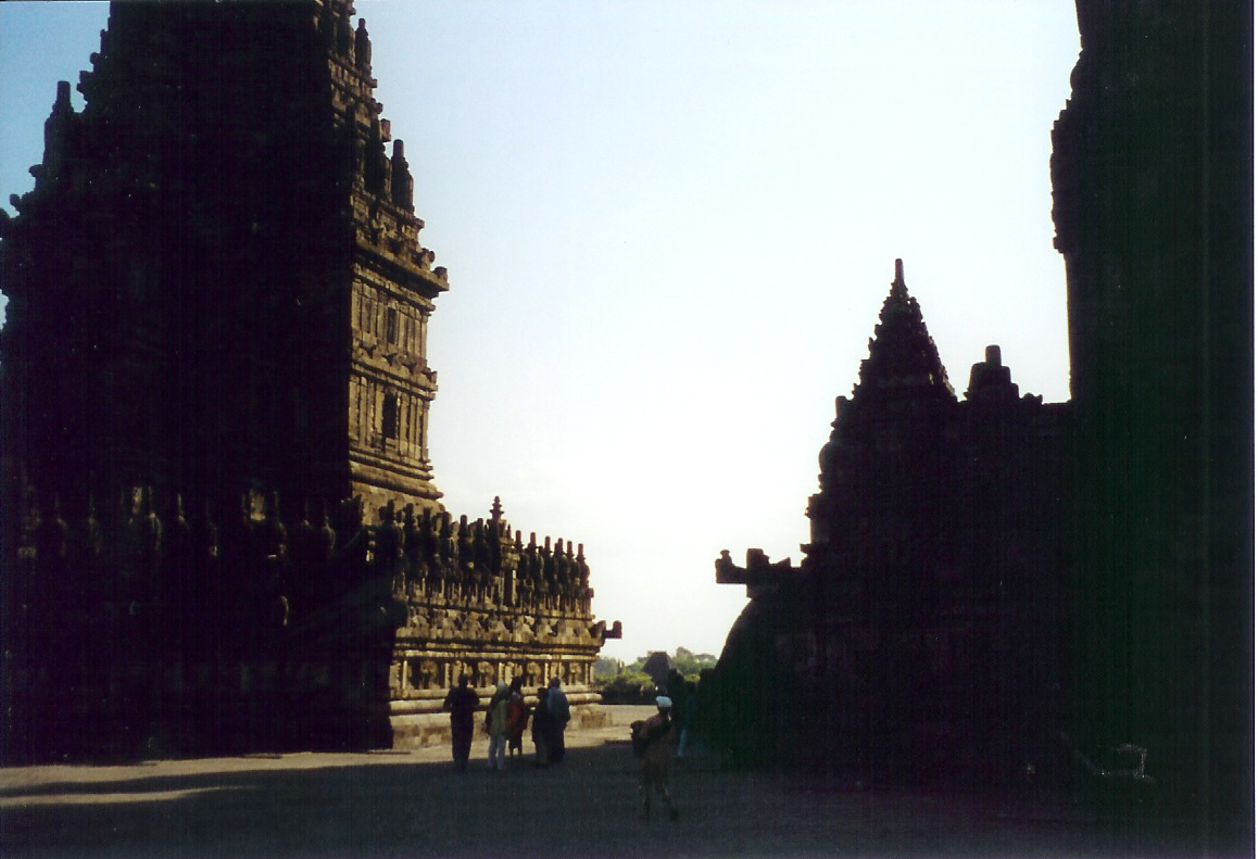 Zelf gemaakt. BesselDekker 5 nov 2005 17:32 (CET)